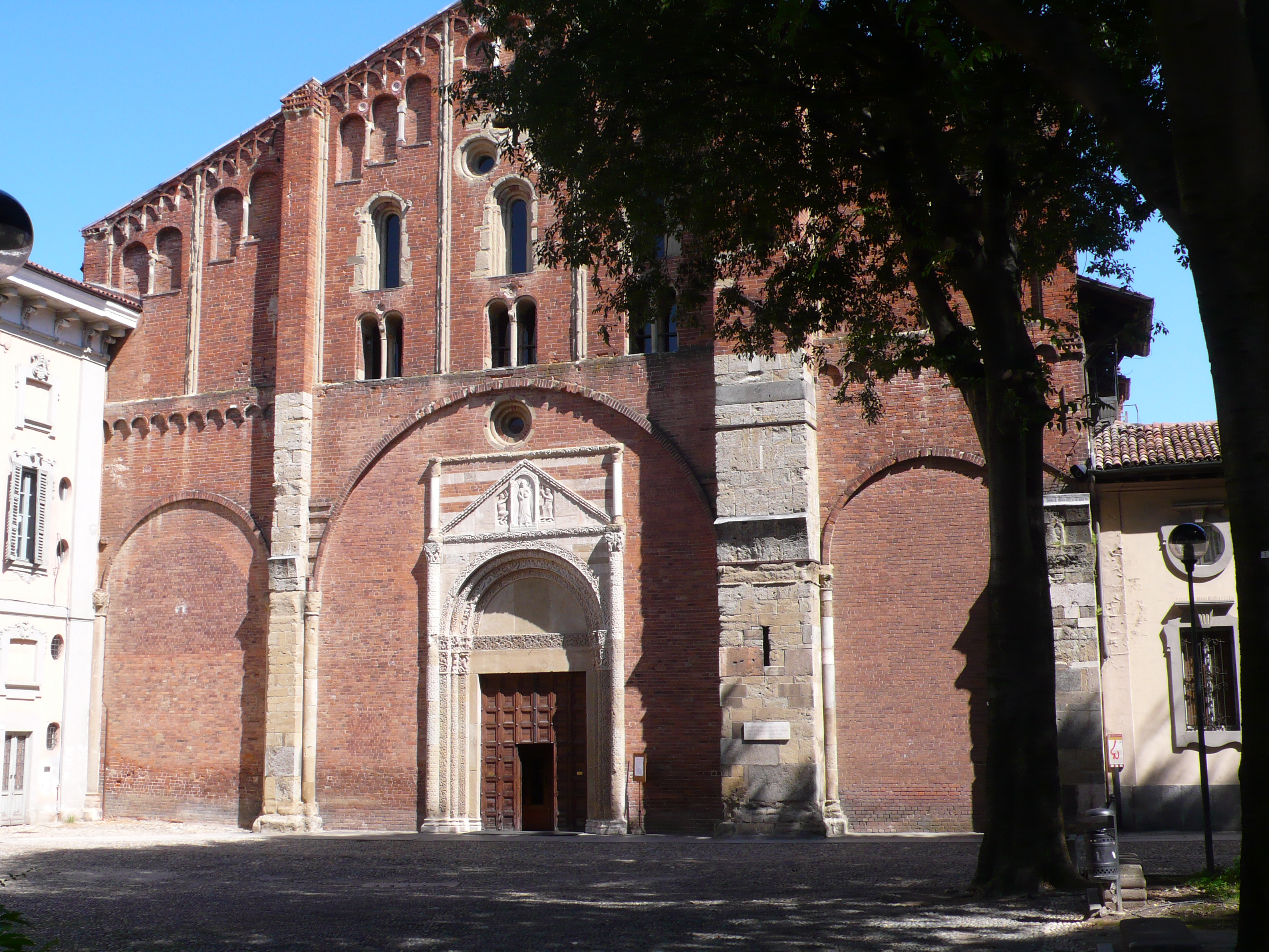 Pavia, San Pietro in Ciel d'Oro, Fassade